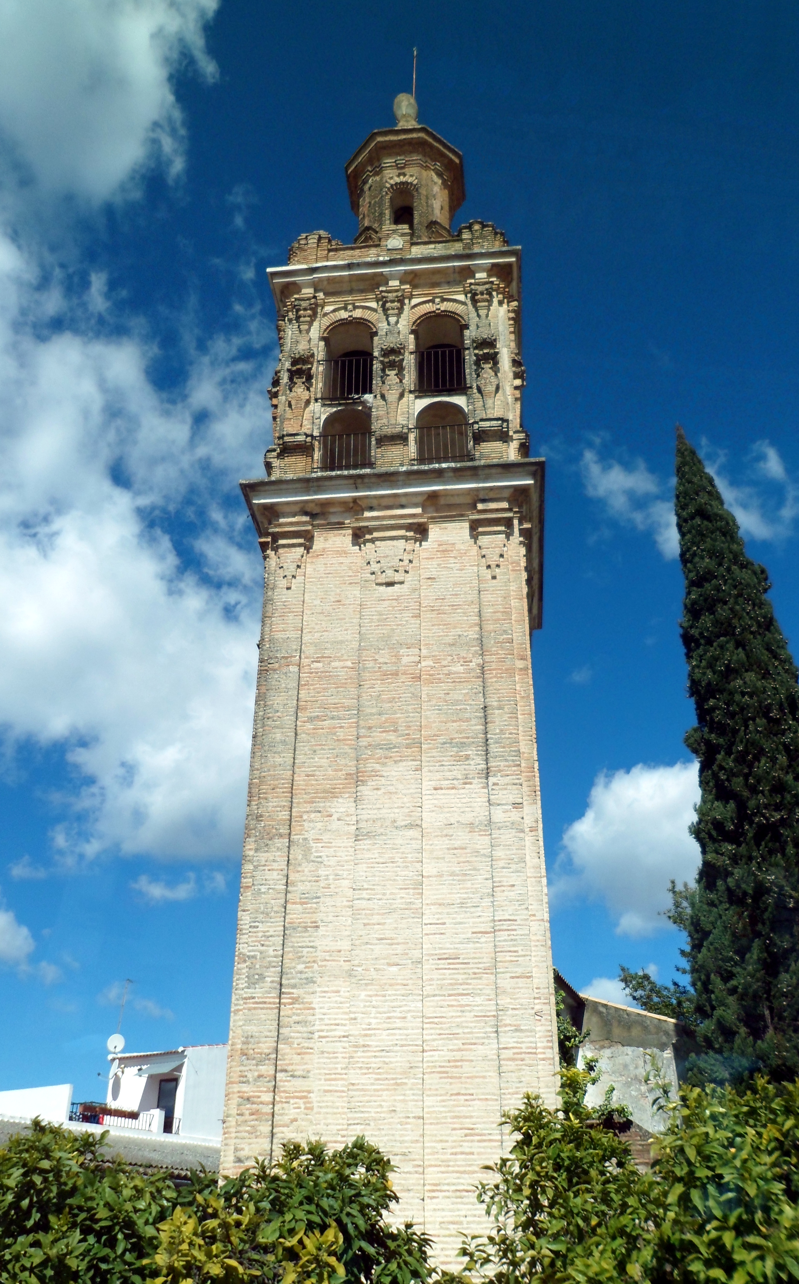 Torre de las Monjas en La Rambla, Córdoba (España).